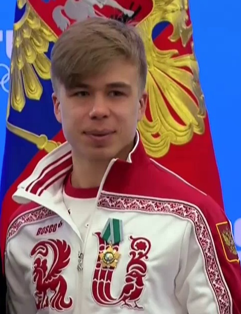 Семен Елистратов